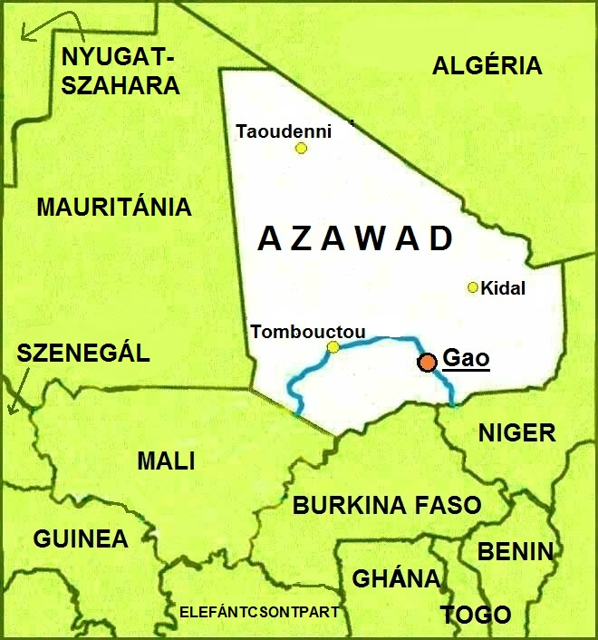 Azawad térkép